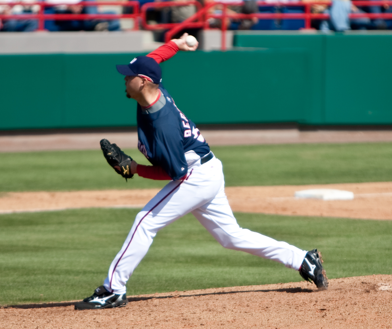 Jason Bergmann